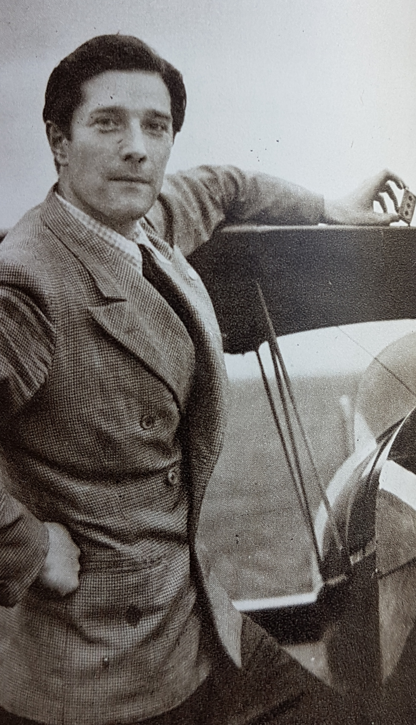 Björn Andreasson 1944